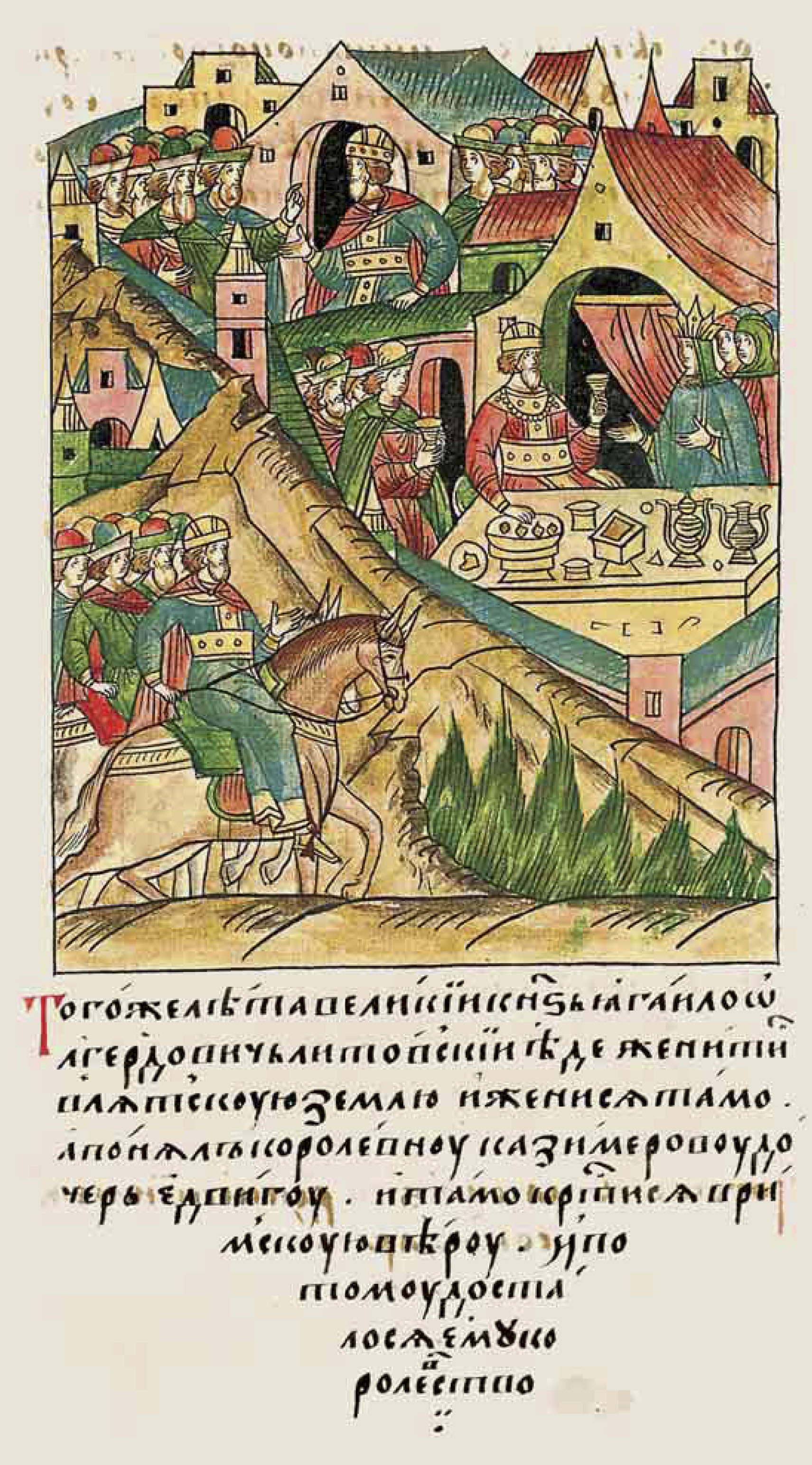 ЛИЦЕВОЙ ЛЕТОПИСНЫЙ СВОД: В том же году великий князь Ягайло Олгердович Литовский поехал жениться в Лятскую землю и женился там, а взял в жены королевну, Казимирову дочь Ядвигу; и там крестился в римскую веру, и потому досталось ему королевство.